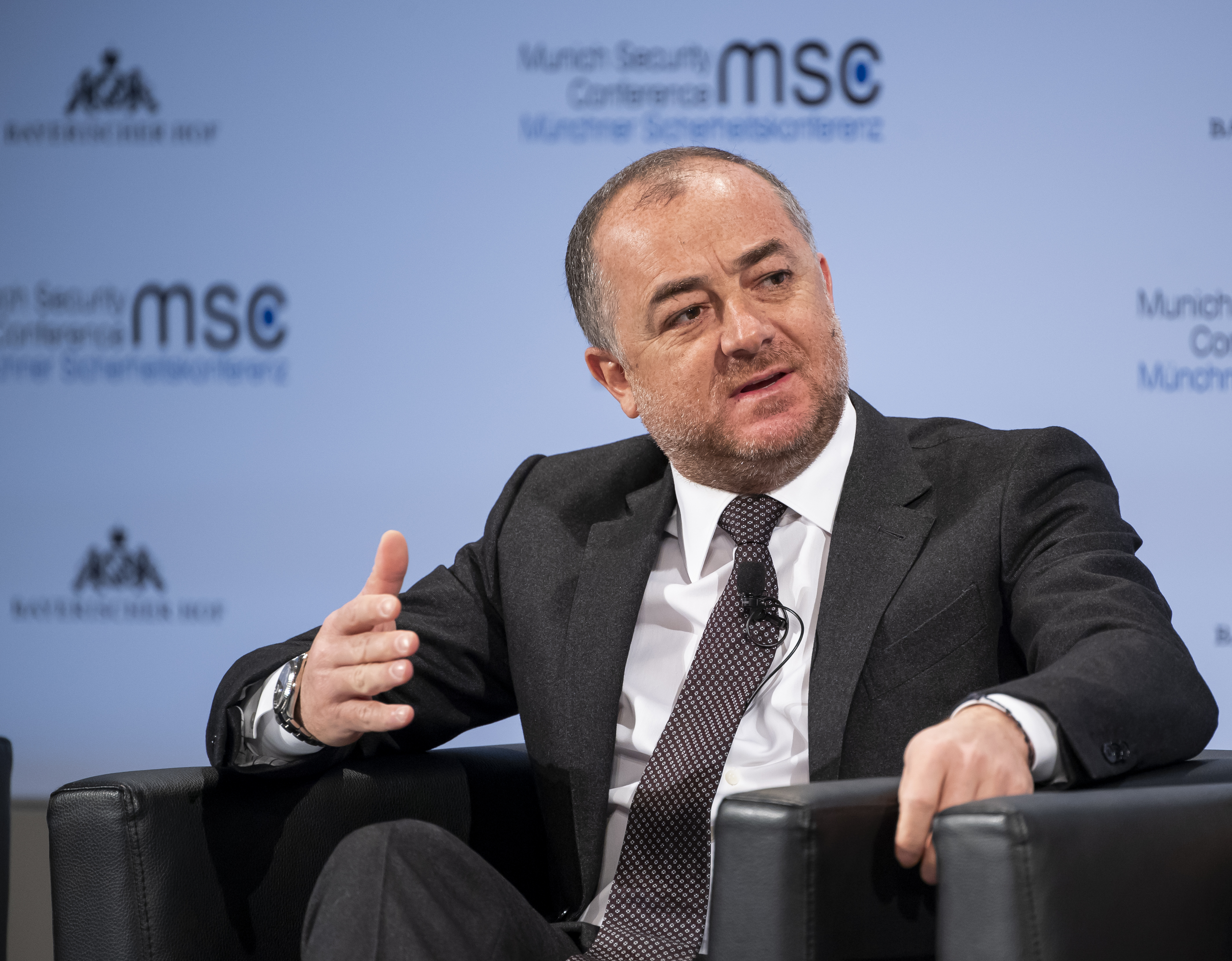 Elias Bou Saab während der Münchener Sicherheitskonferenz 2019